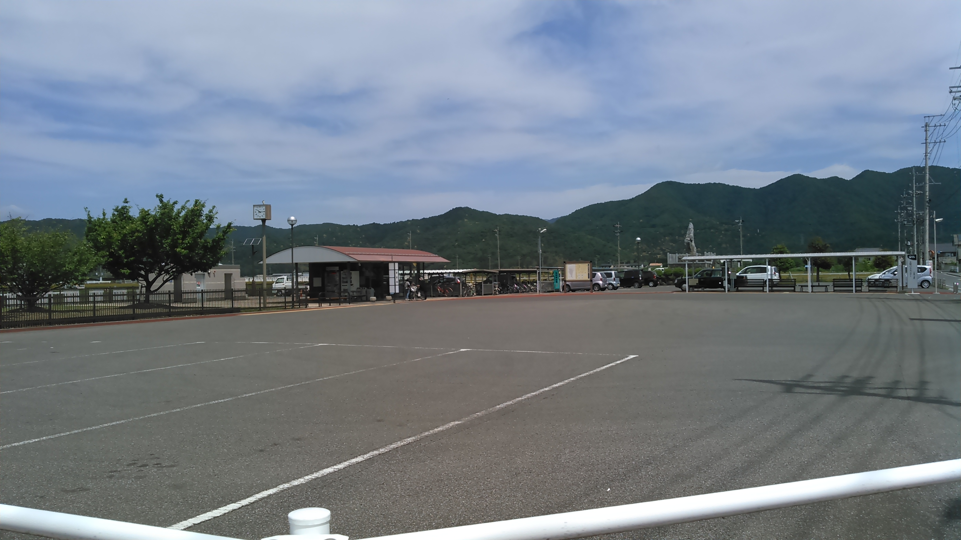 大野バスセンターの全景。 岐阜バス・名阪近鉄バス・揖斐川町コミュニティバスが撮影当時の終着バスターミナルであった。